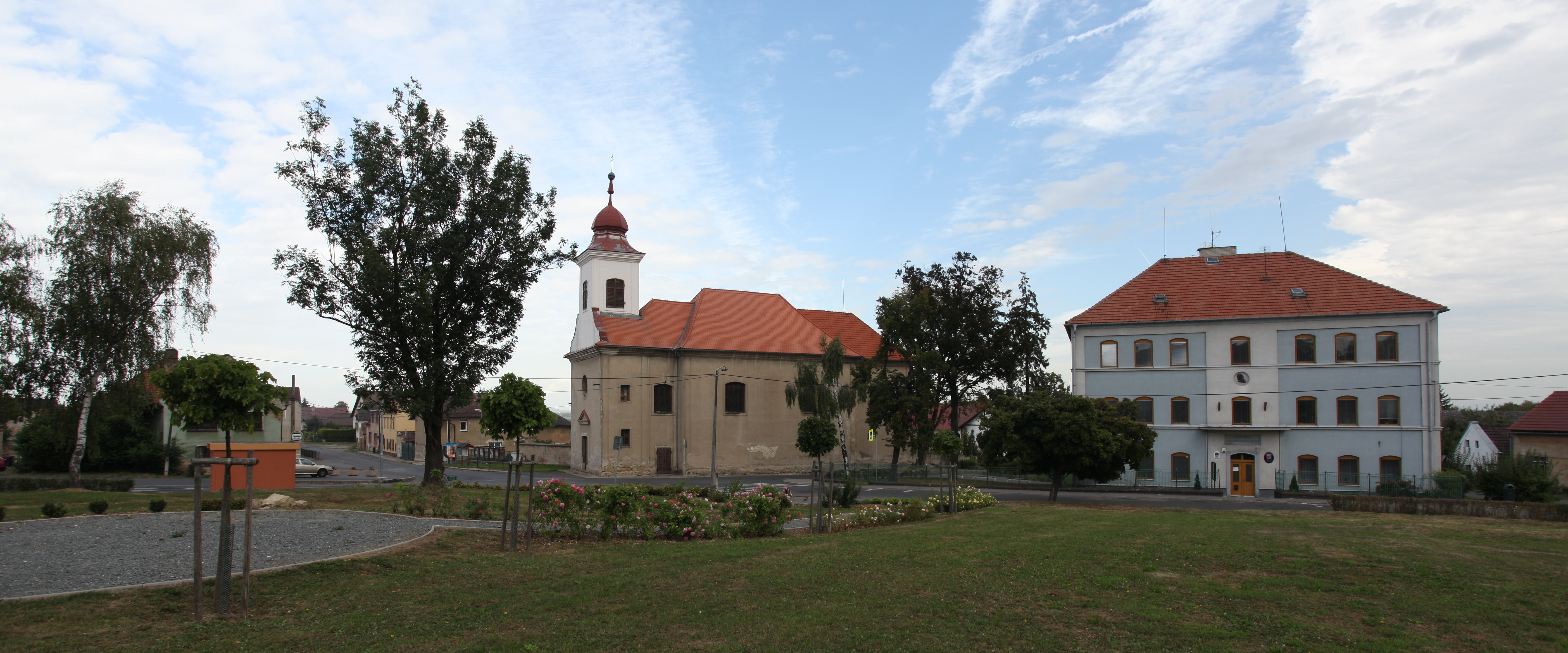 Dolní Slivno, náves s kostelem sv. Františka Serafinského a obecním úřadem